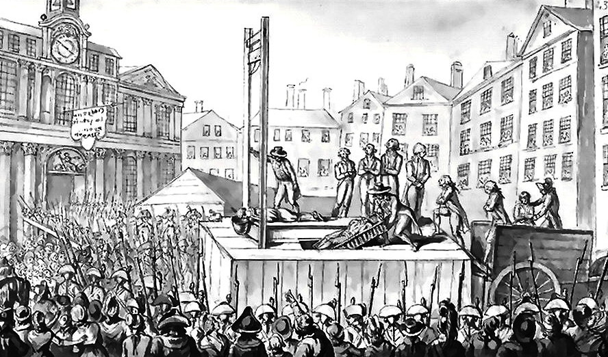 Supplice de neuf émigrés en octobre 1793